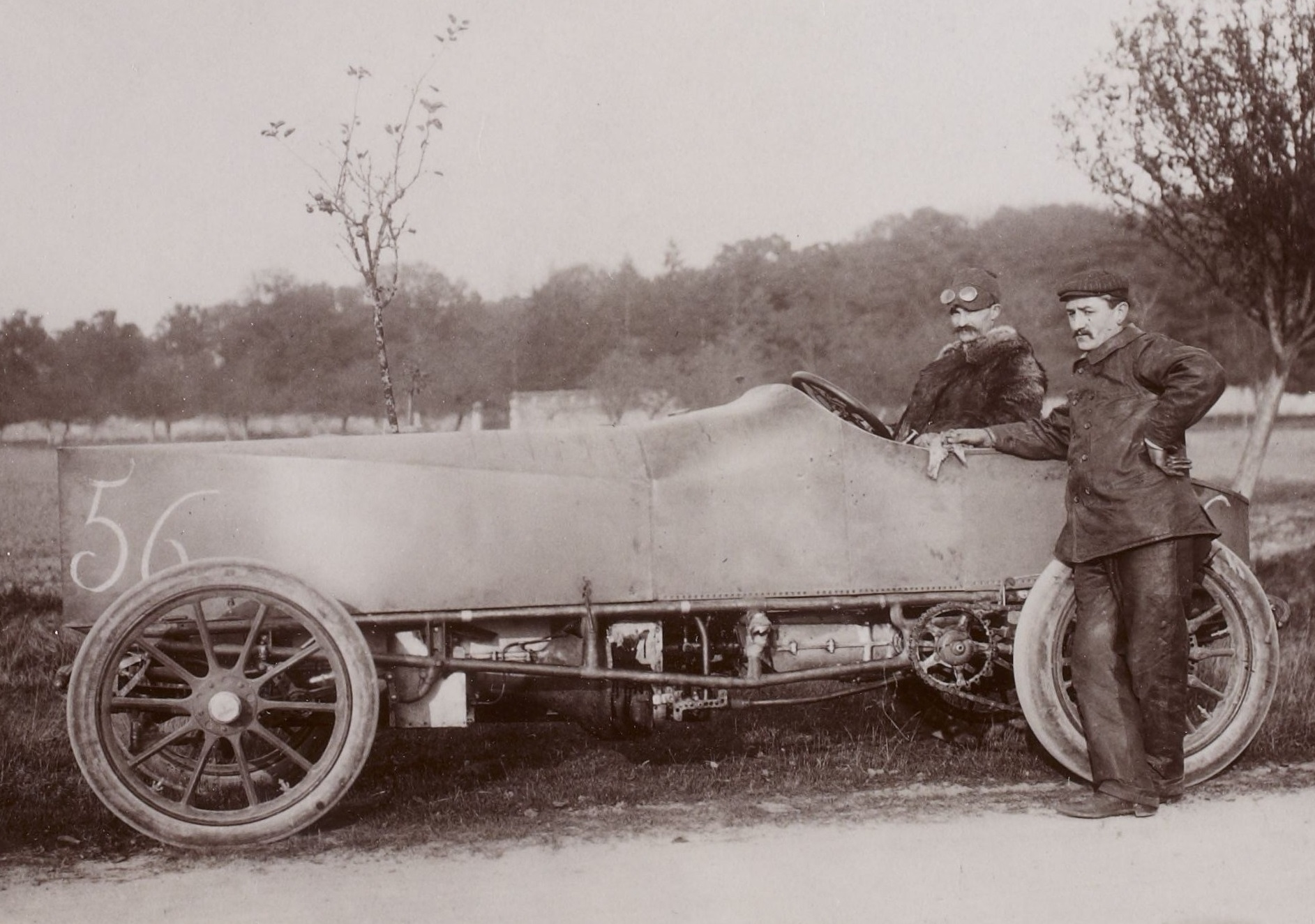 [Collection Jules Beau. Photographie sportive] : T. 28. AnnÃ©e 1904 / Jules Beau : F. 28v. [Course de cÃ´te de Gaillon, organisÃ©e par l' Auto, 30 octobre 1904]